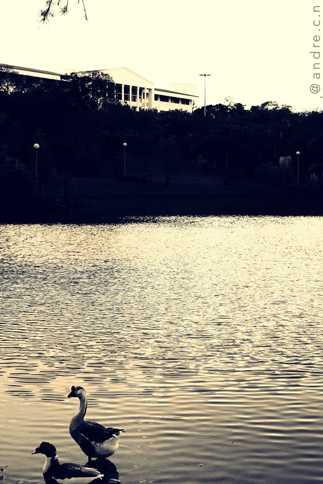 CENTRAL DE ENSINO IV